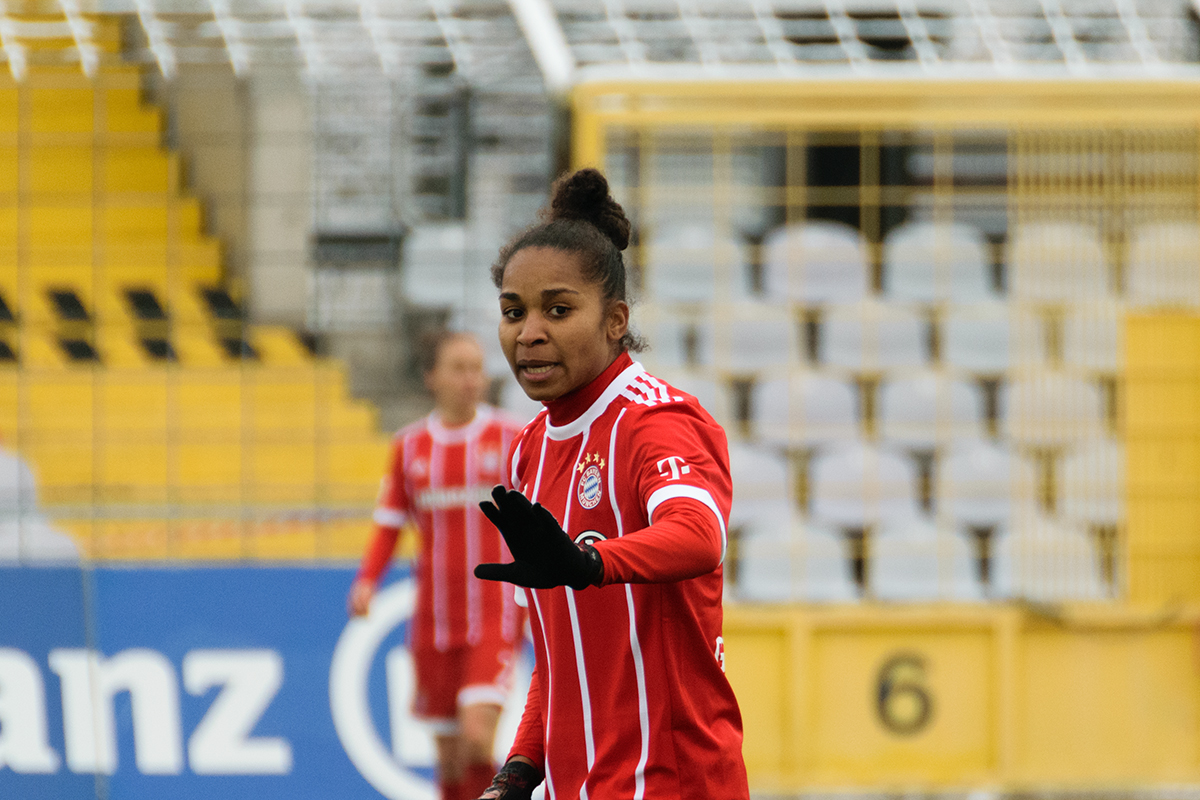 Laura Georges at her debut for FC Bayern vs SGS Essen